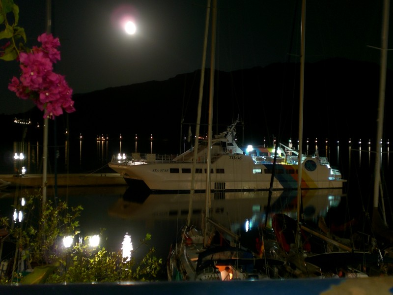 Titel: Seacat onder het maanlicht Locatie: Livadi, Tilos, Griekenland Datum: september 2006 Fotograaf: Gebruiker:IMFJ